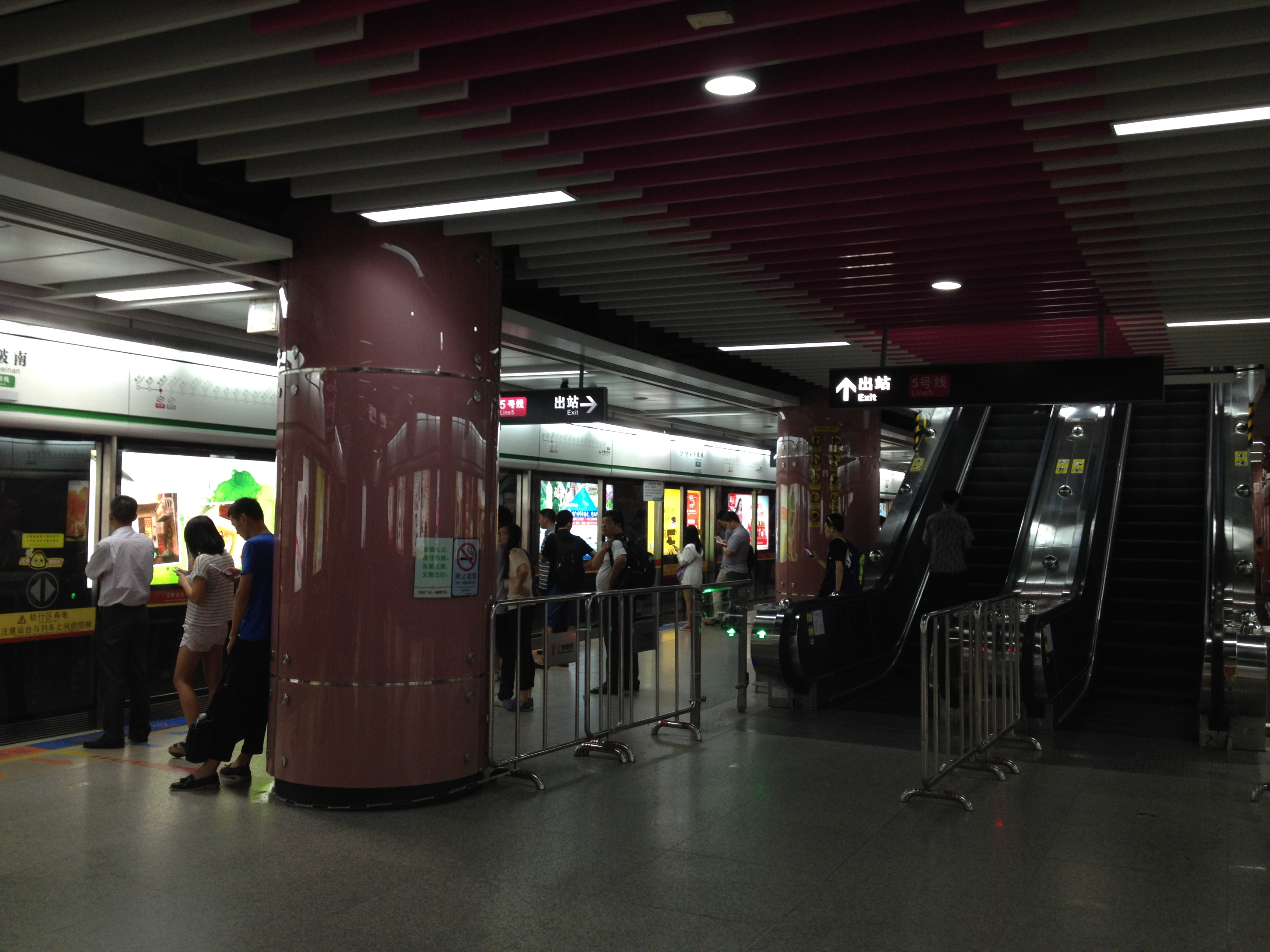 广州地铁4号线车陂南站站台